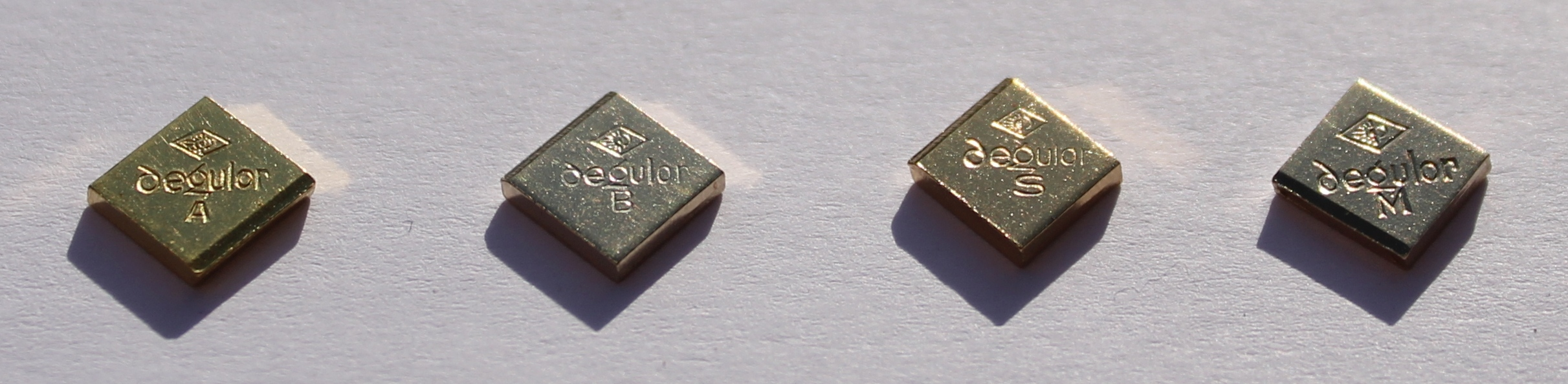 Verschiedene Legierungen von Dentalgold, Farbvergleich